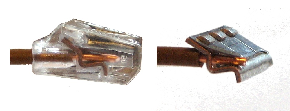 Federklemme